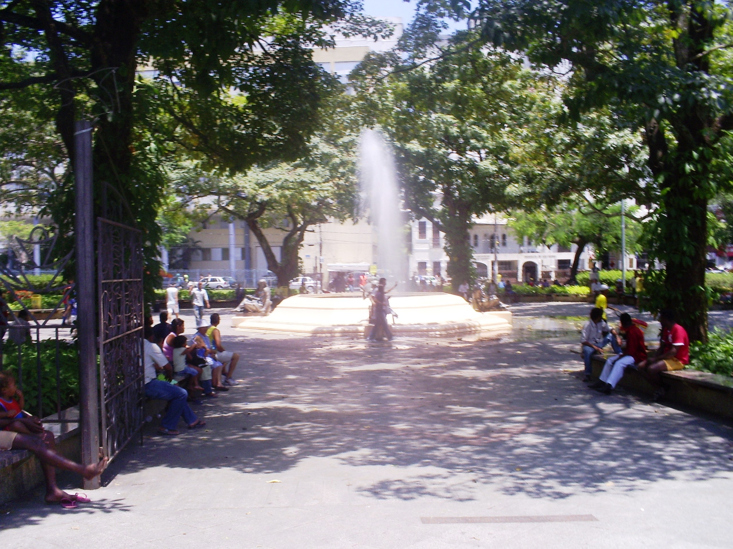 Foto da Praça da Piedade, Salvador, Bahia, Brasil.